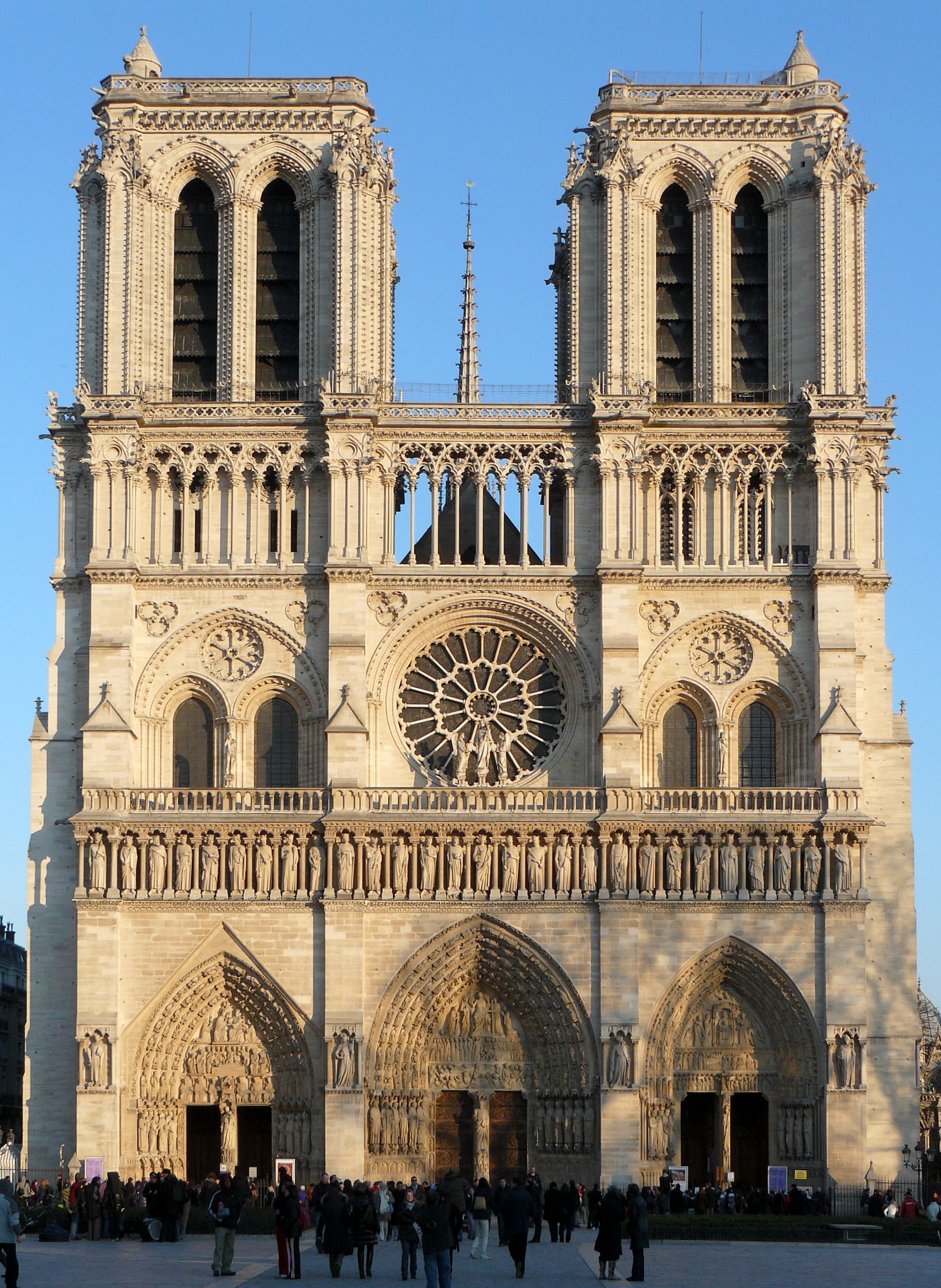 Façade occidentale de N-D de Paris, 18 h